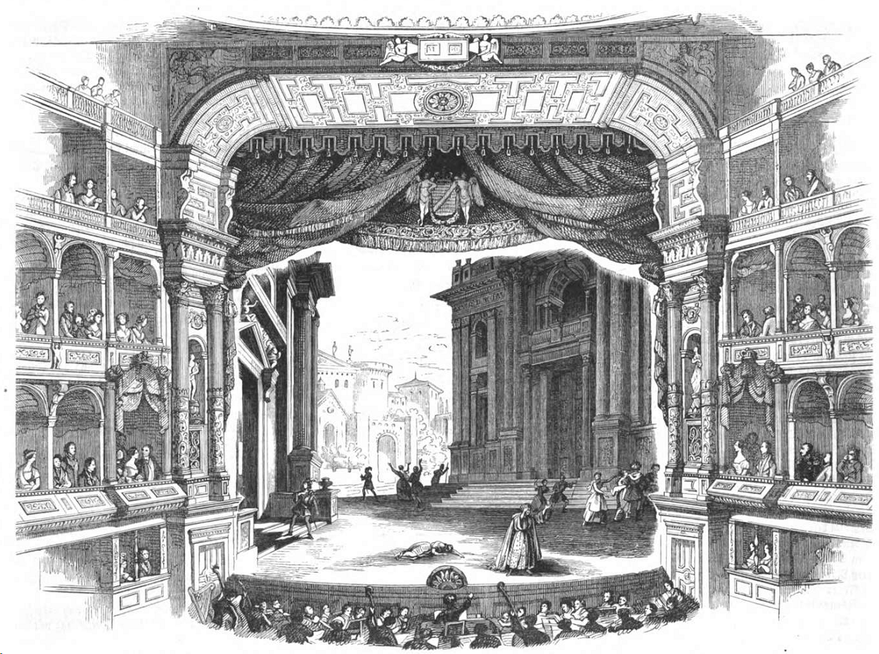 Königl. Hoftheater in Dresden. – Cola Rienzi, große tragische Oper von Richard Wagner. – Act IV, letzte Scene.